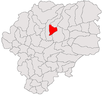 Categorie:Hărţi ale judeţului Bistriţa-Năsăud